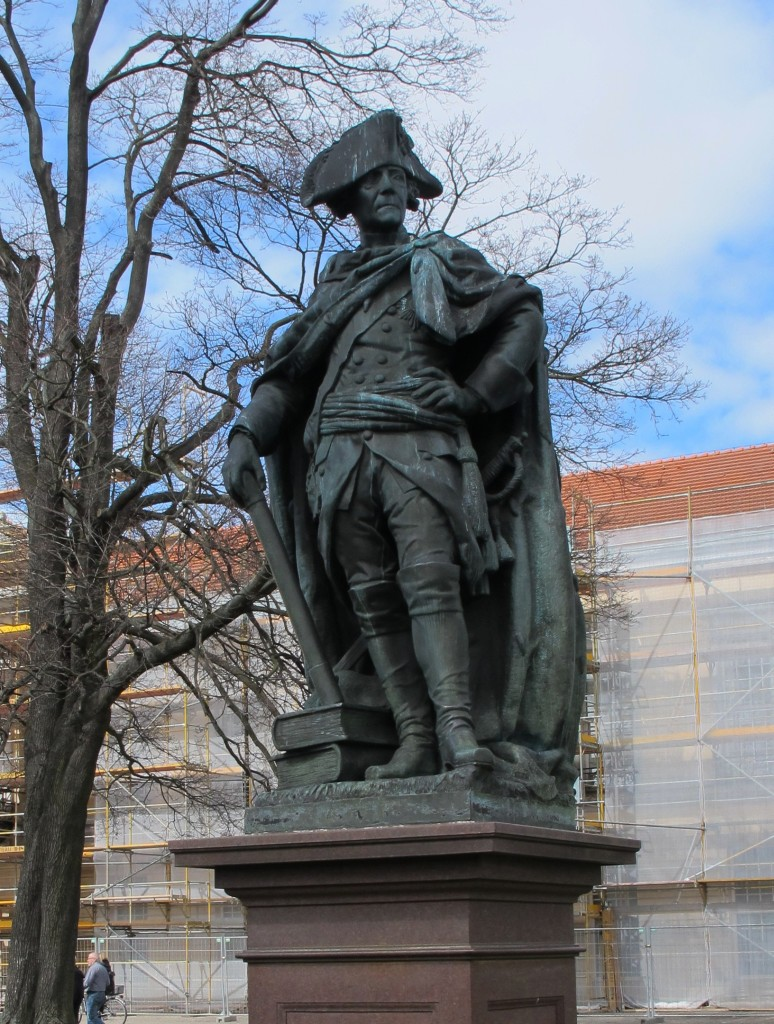 Berlin, Schloss Charlottenburg, Neuer Flügel, Friedrich der Große, Standbild von Goffried Schadow